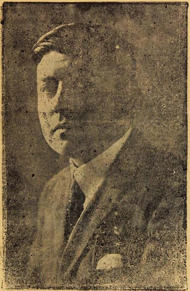 Leonardo Guzmán Cortés (Antofagasta, 6 de febrero de 1890 - Santiago, 6 de mayo de 1971) fue un médico y político chileno. Es considerado como uno de los pioneros de la oncología en Chile,1 sentando las bases de la Sociedad Chilena de Cancerología. En su memoria, el Hospital Regional de Antofagasta lleva su nombre desde 14 de octubre de 1972